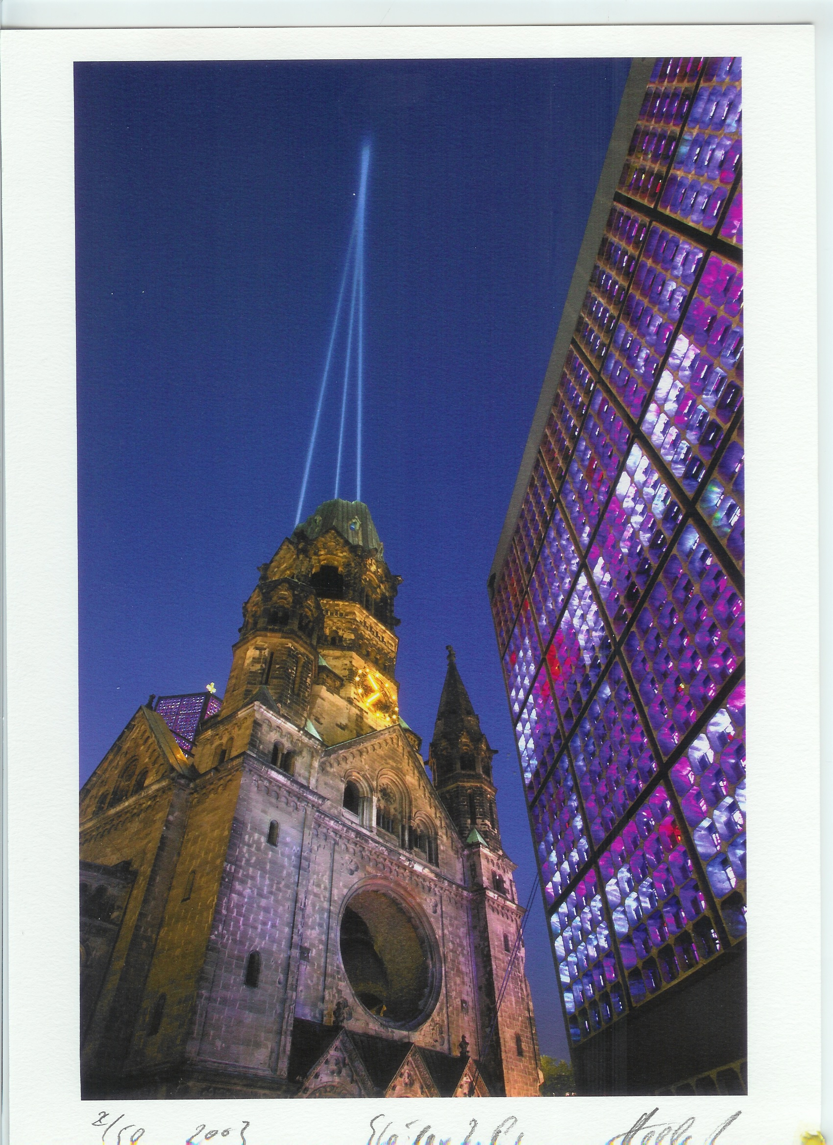 Kopie von 1+1+1=1, Lichtinstallation, zur Ökomenischen Kirchen Tag